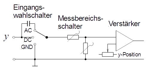 typische Eingangsschaltung für einen Kanal eines Oszillpskops